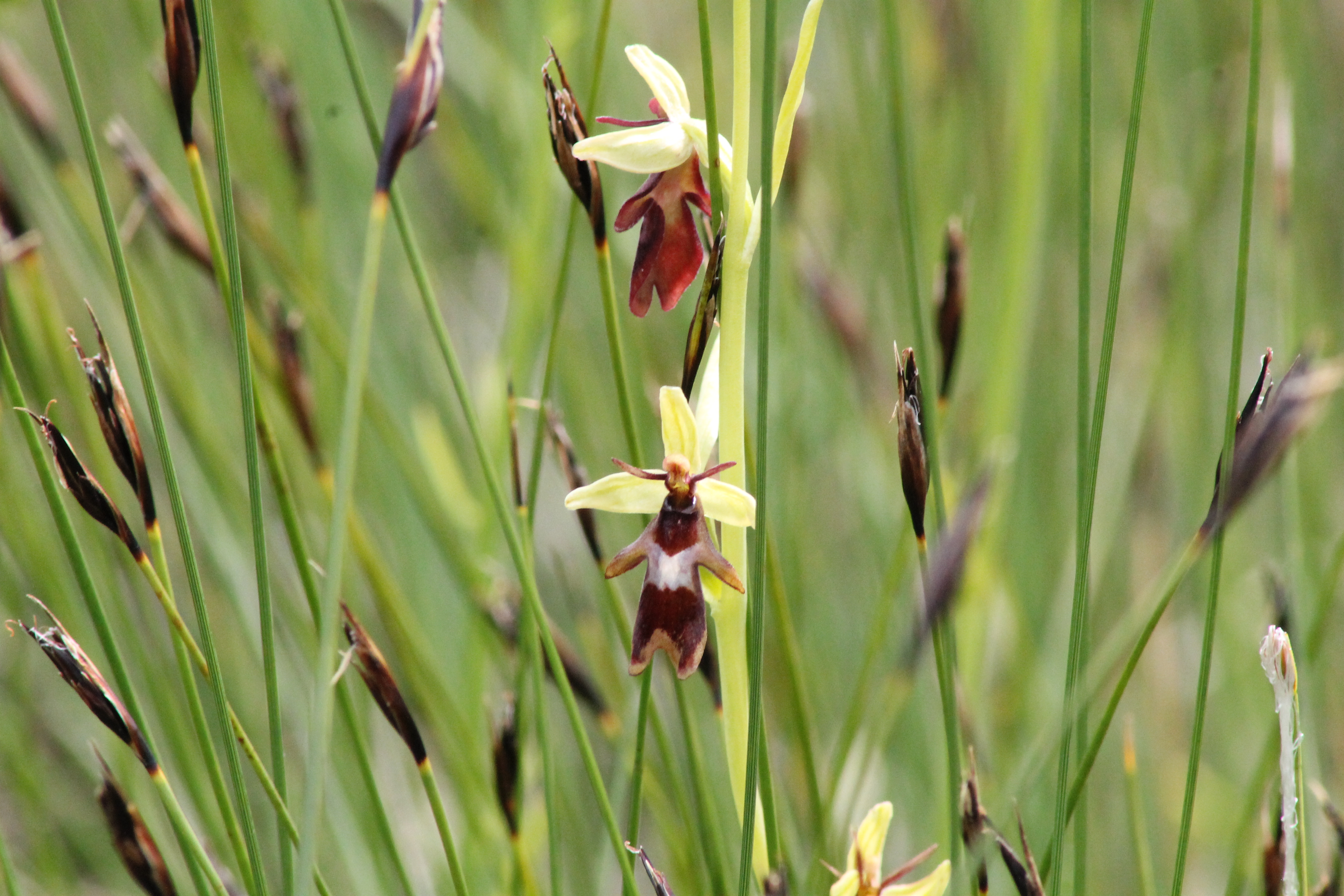 (Ophrys insectifera) kärpselill, kärbsejuur, kärblase juur